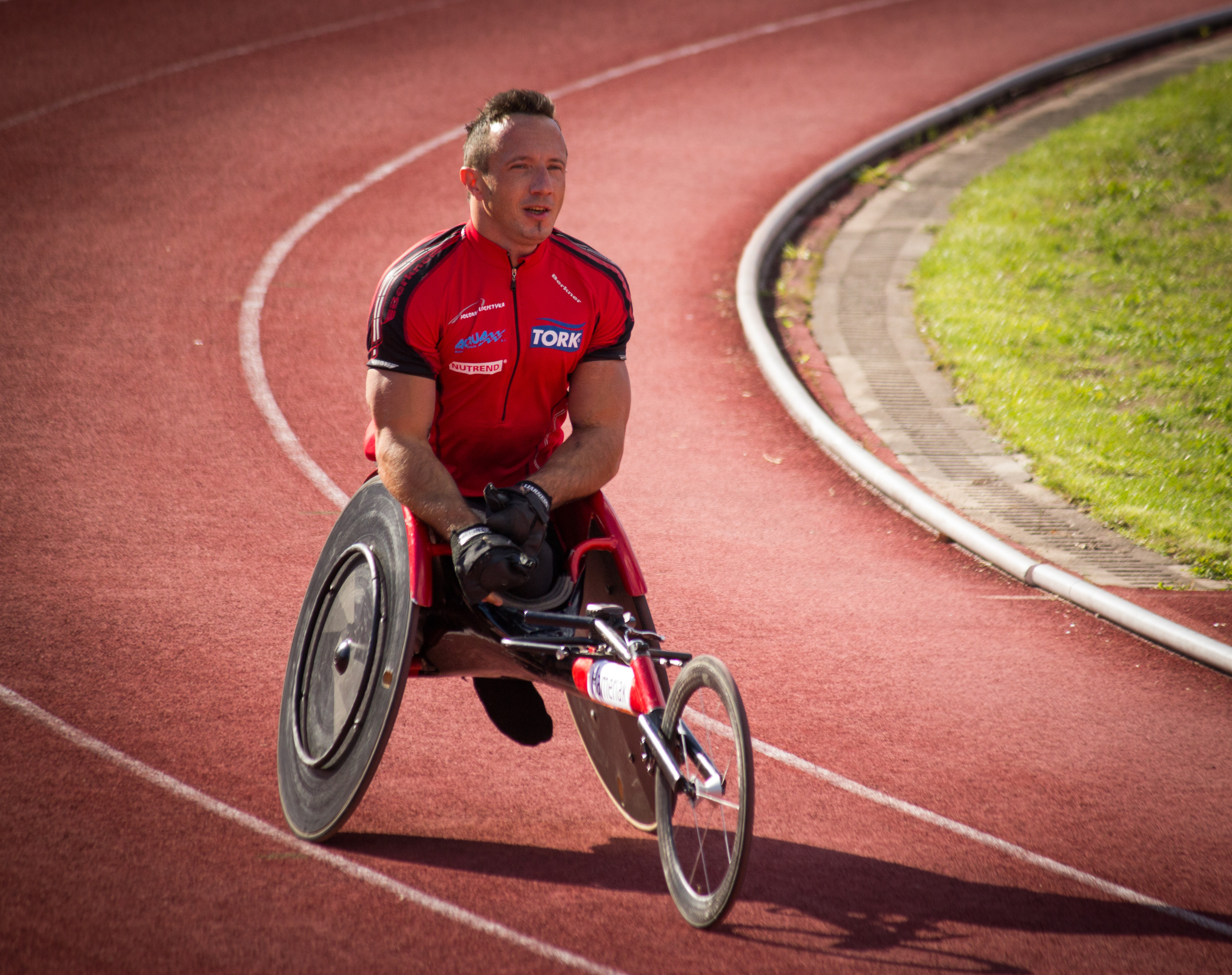 Memoriał Kamili Skolimowskiej w Warszawie, 2013-08-25